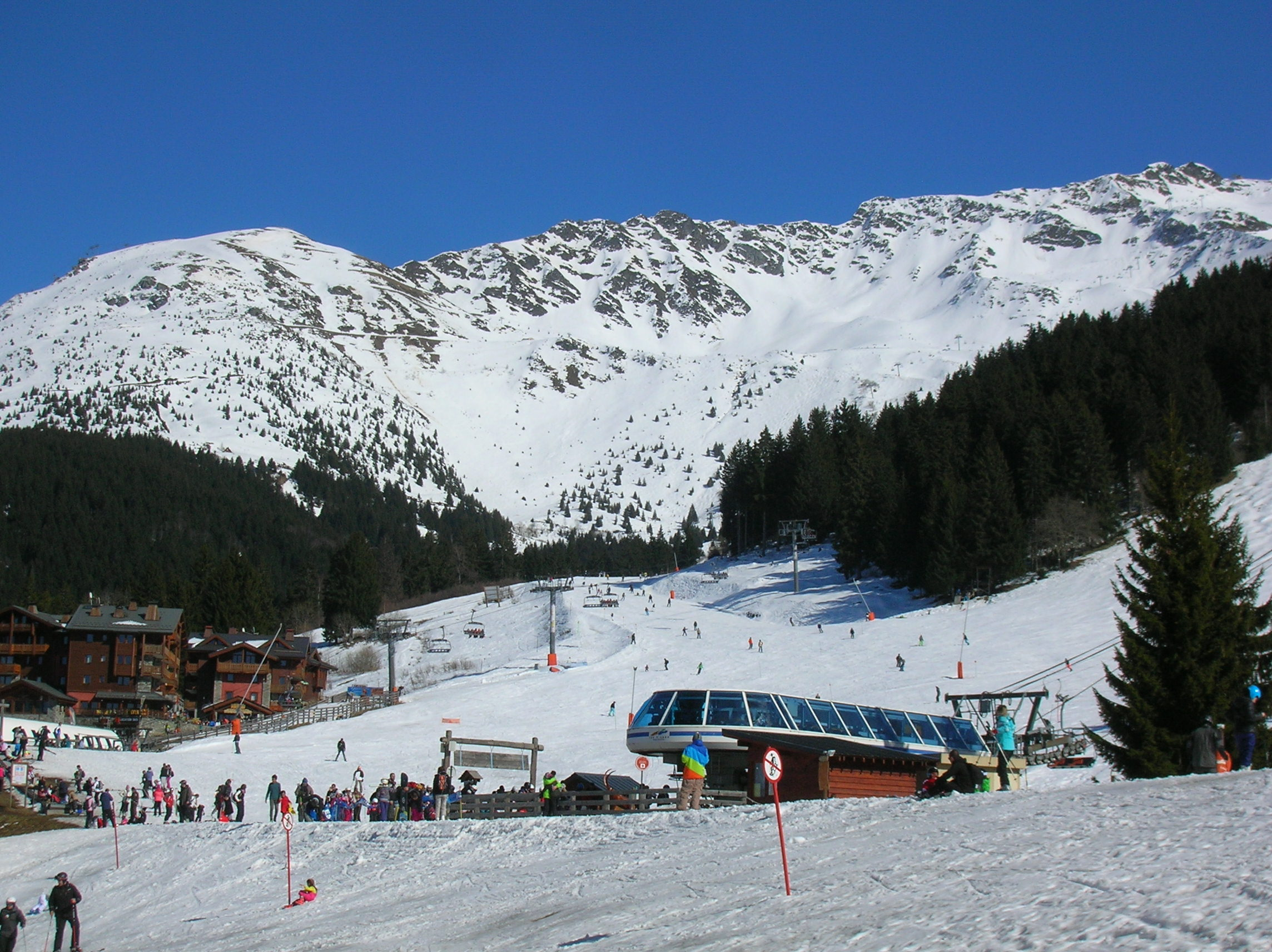 domaine skiable de Prapoutel (Les 7 Laux), en fin de saison. Les Adrets, Isère, France.